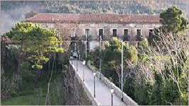 Facciata del Palazzo Mazziotti di Celso, vista dal muraglione.